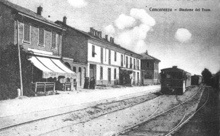 Concorezzo, stazione tram